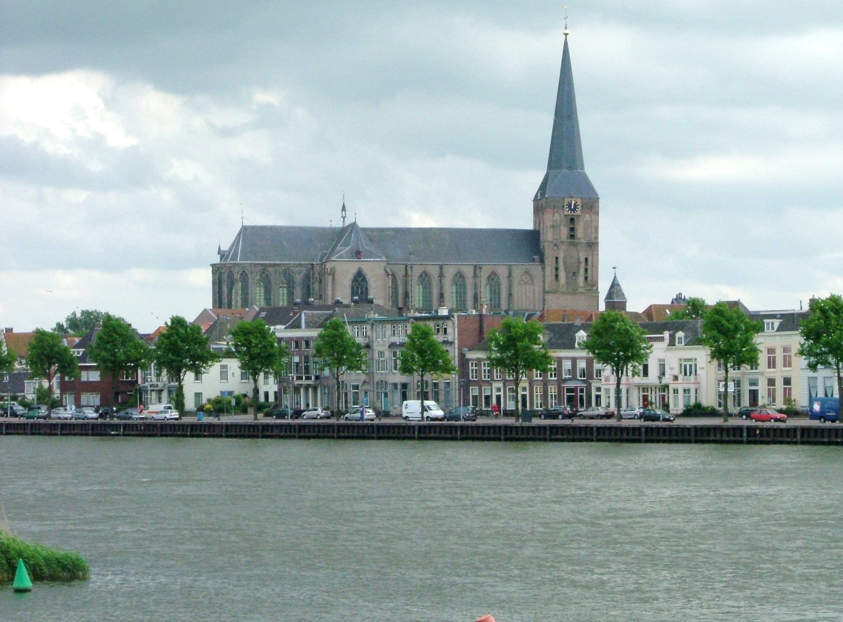 Eigen Materieel Geert C. Smulders, Rosmalen Categorie:Wikipedia:Afbeeldingen/Gebruiker:Hsf-toshiba Categorie:Afbeelding Kampen